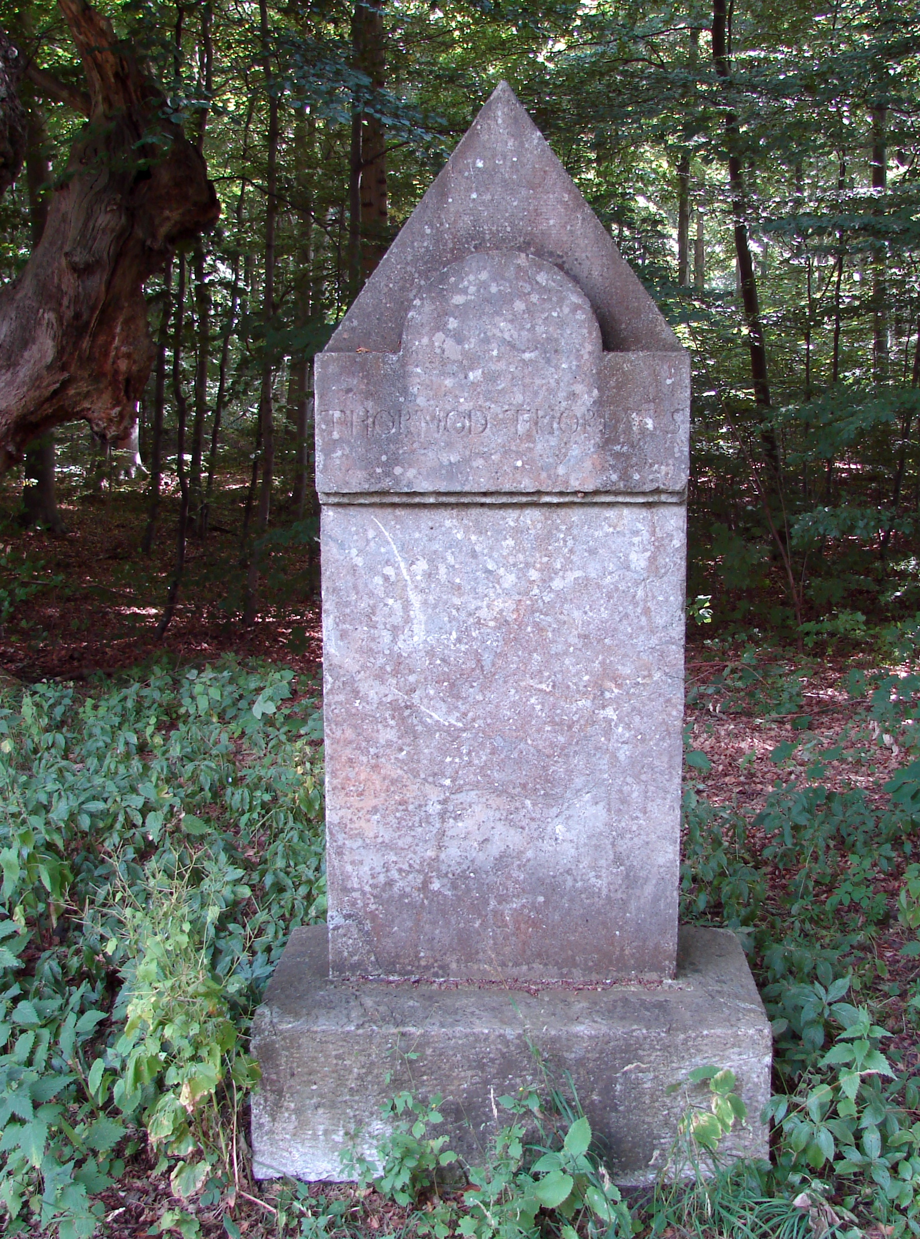 Mindestøtte over Thormod Torfæus (Þormóður Torfason) (1636-1719), marmor fra Gjellebæk i Norge, opsat 1778, Johannes Wiedewelt (1731-1802), Mindelunden ved Jægerspris Slot, Sjælland, Danmark